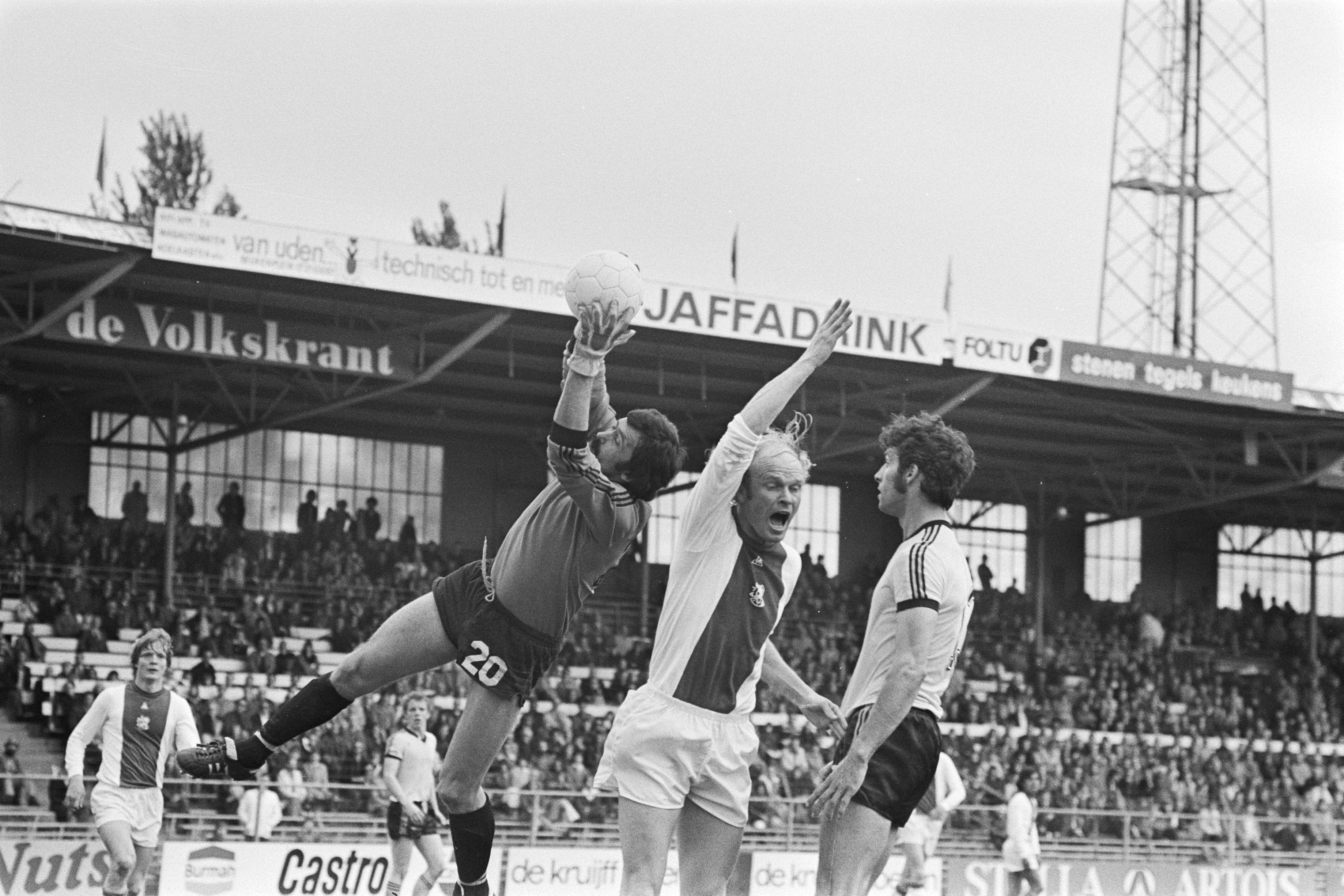 Collectie / Archief : Fotocollectie Anefo Reportage / Serie : [ onbekend ] Beschrijving : Ajax tegen Roda JC 1-2, Doelman Jo van der Mierden vangt de bal voordat Ruud Geels gevaarlijk kan worden. Naast Geels staat Dick Nanninga Datum : 8 mei 1977 Locatie : Amsterdam, Noord-Holland Trefwoorden : sport, voetbal Persoonsnaam : Geels, Ruud, Mierden, Jo van der, Nanninga, Dick Instellingsnaam : Roda JC Fotograaf : Croes, Rob C. / Anefo Auteursrechthebbende : Nationaal Archief Materiaalsoort : Negatief (zwart/wit) Nummer archiefinventaris : bekijk toegang 2.24.01.05 Bestanddeelnummer : 929-1673